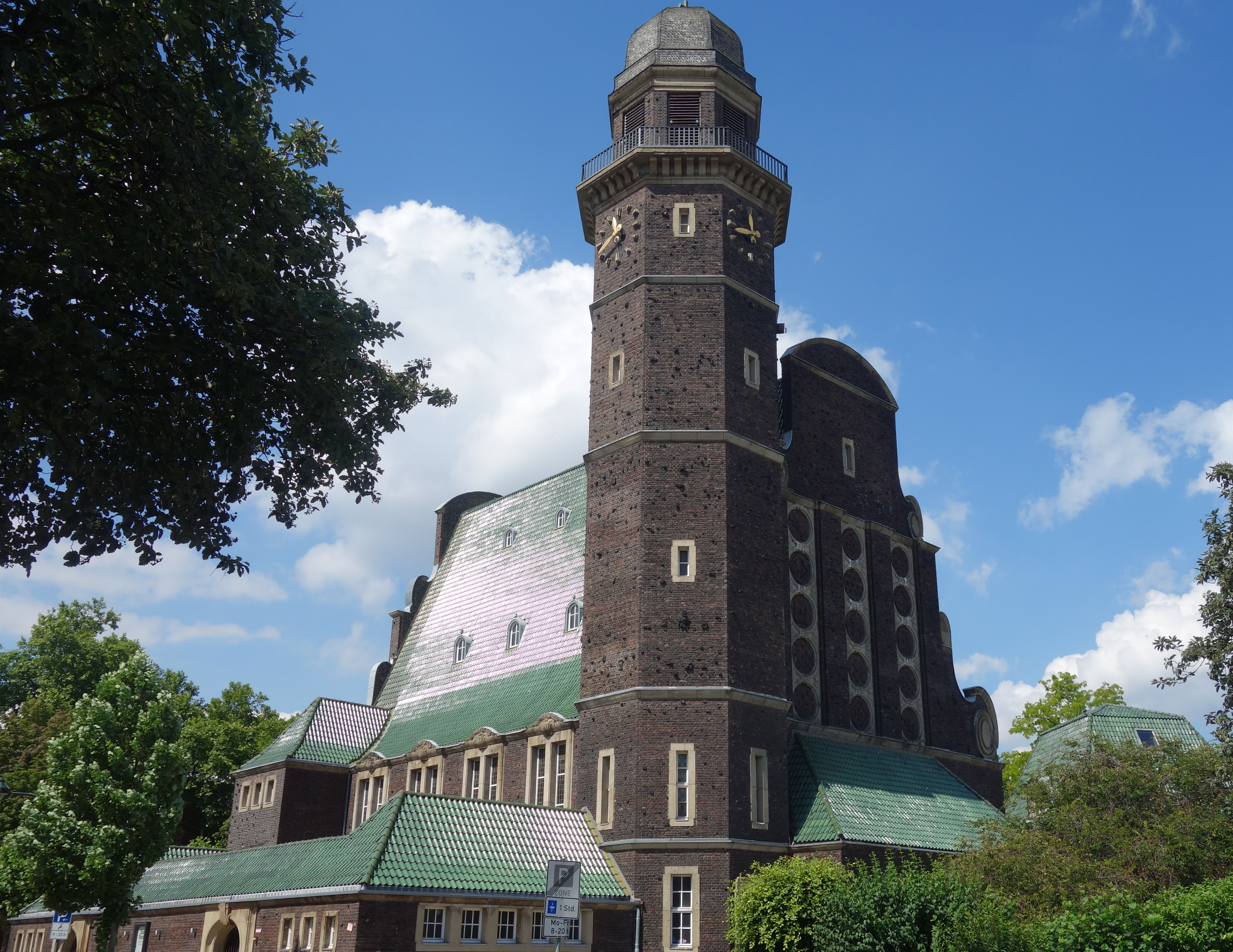 Evangelische Auferstehungskirche in Düsseldorf-Oberkassel